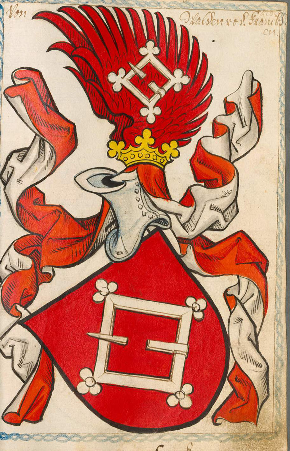 Scheibler'sches Wappenbuch , älterer Teil Franken Wallenrode